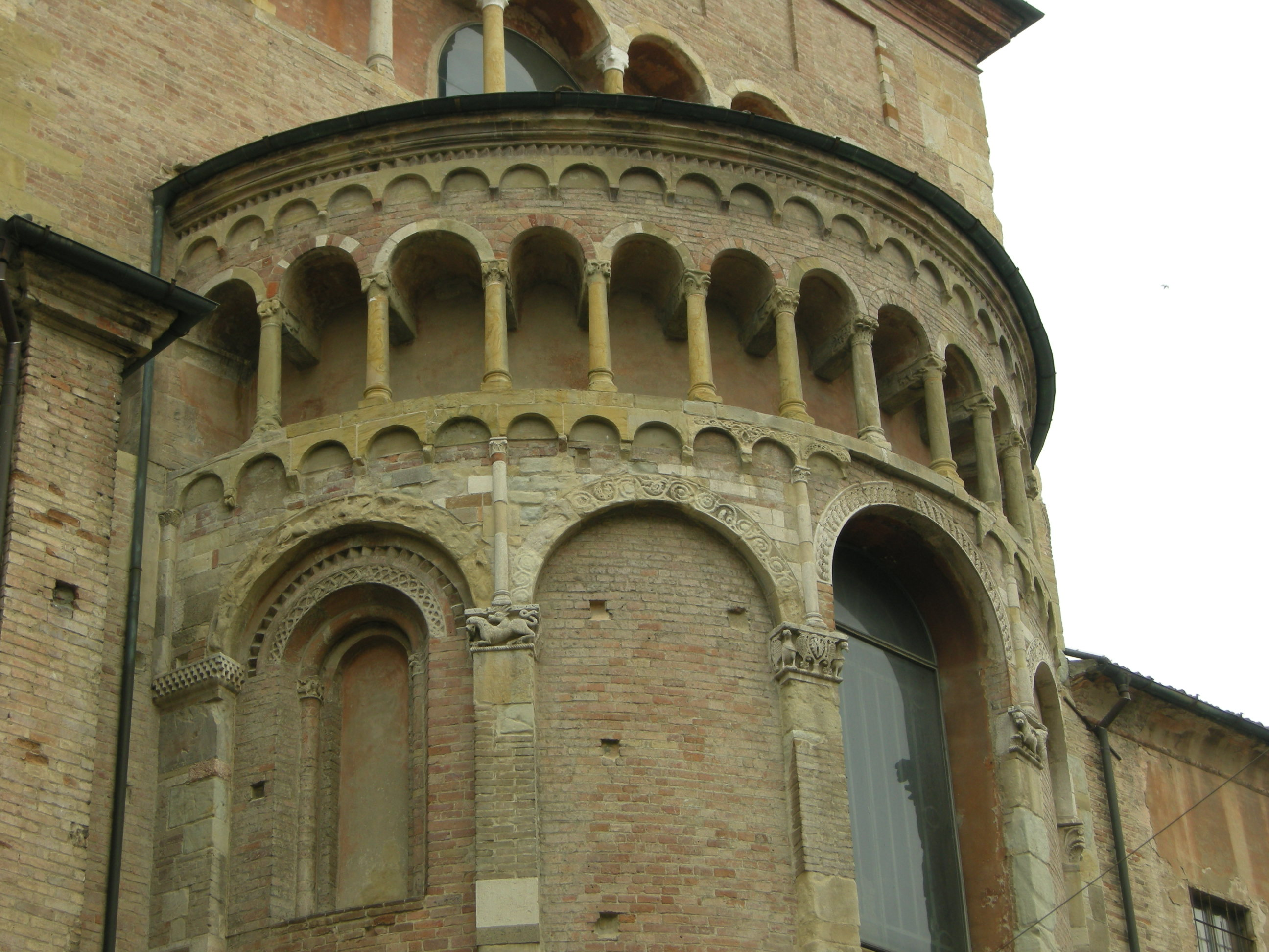 Duomo di parma, abside dx